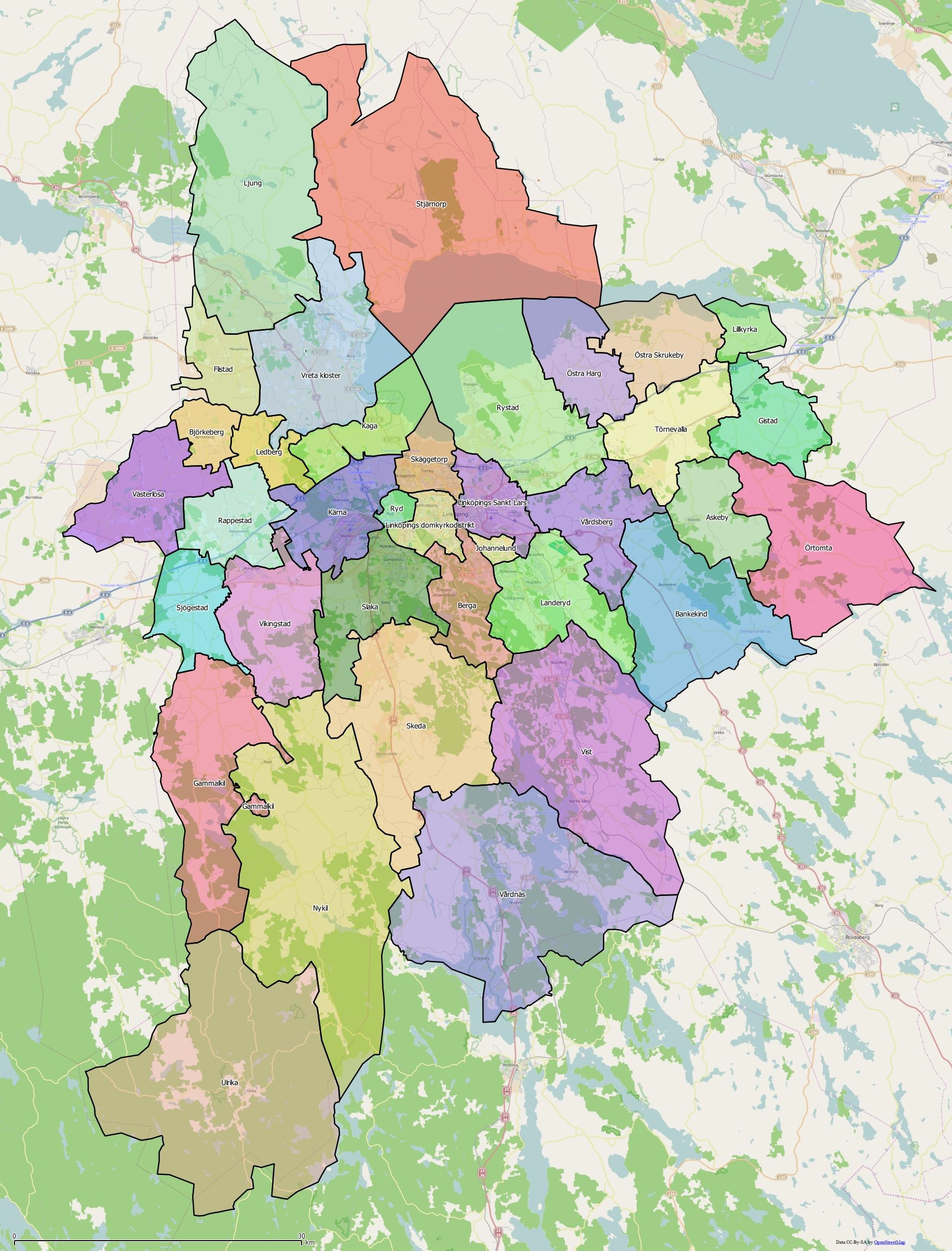 Distriktsindelningen i Linköpings kommun